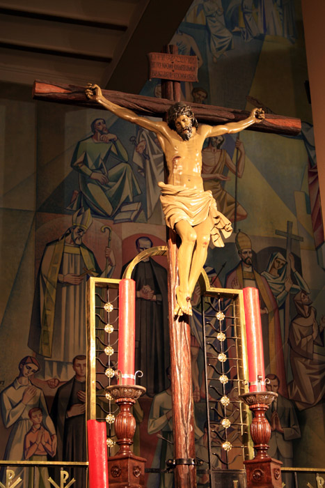 Santísimo Cristo de la Humildad, Cofradía del Silencio, Jaén, España.